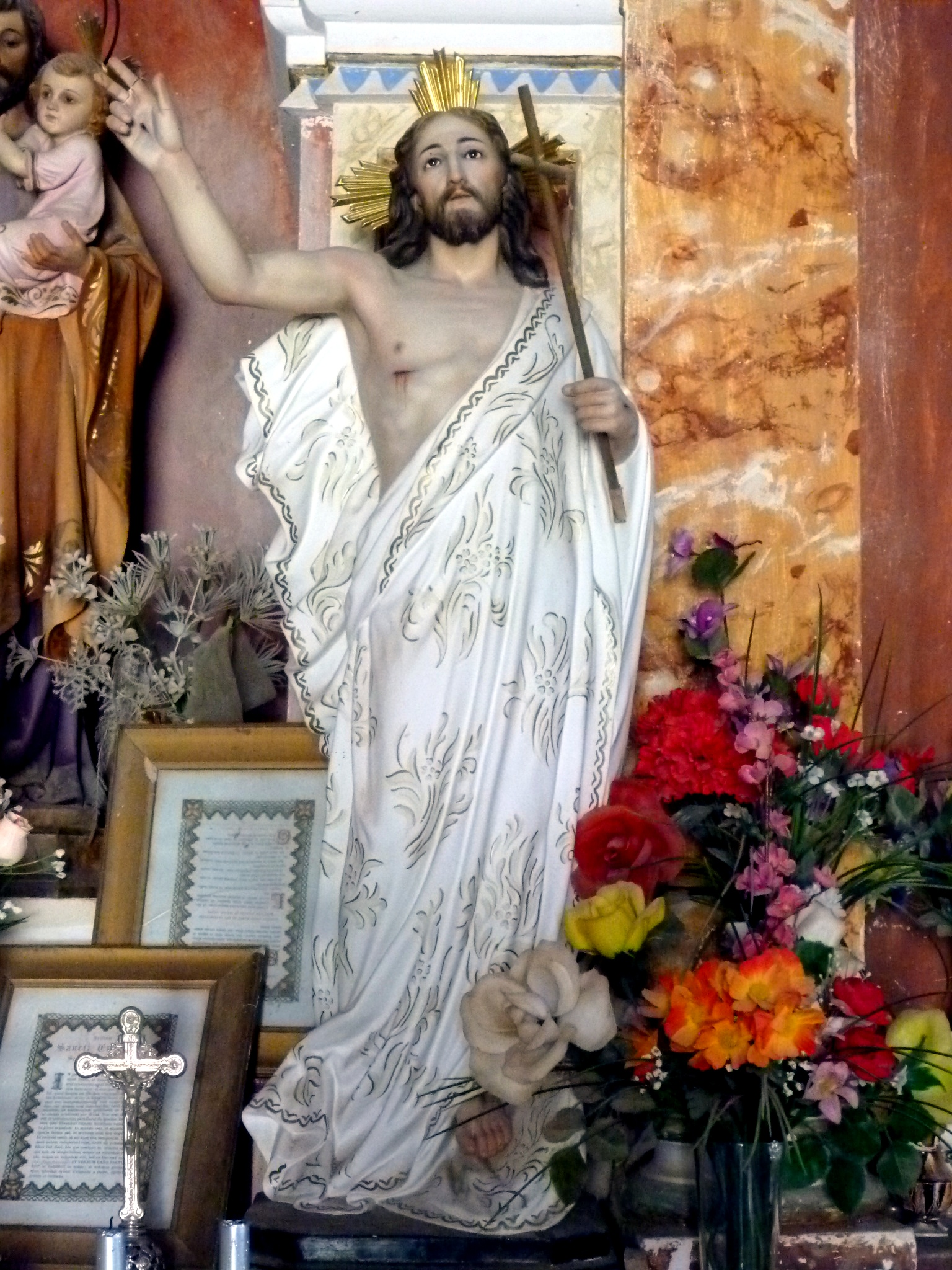 Masia Castellana (Pinell de Solsonès): capella: imatge procedent de la capella de l'Ascensió